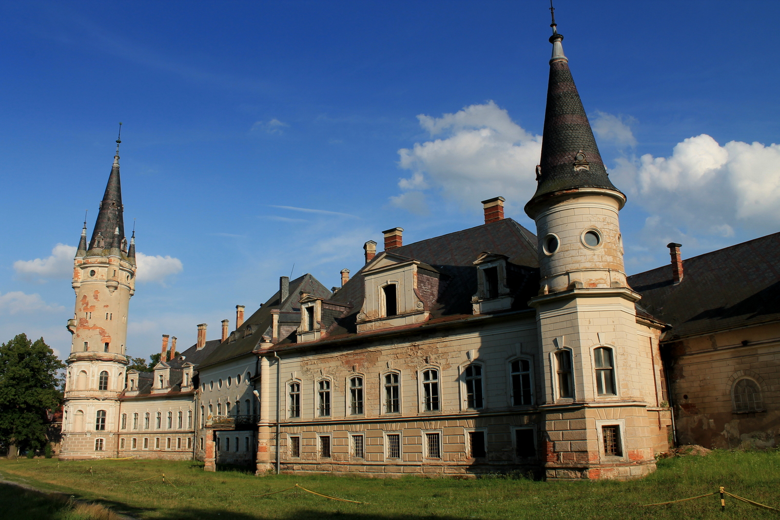 Bożków, pałac, XVI, 1787, 1871